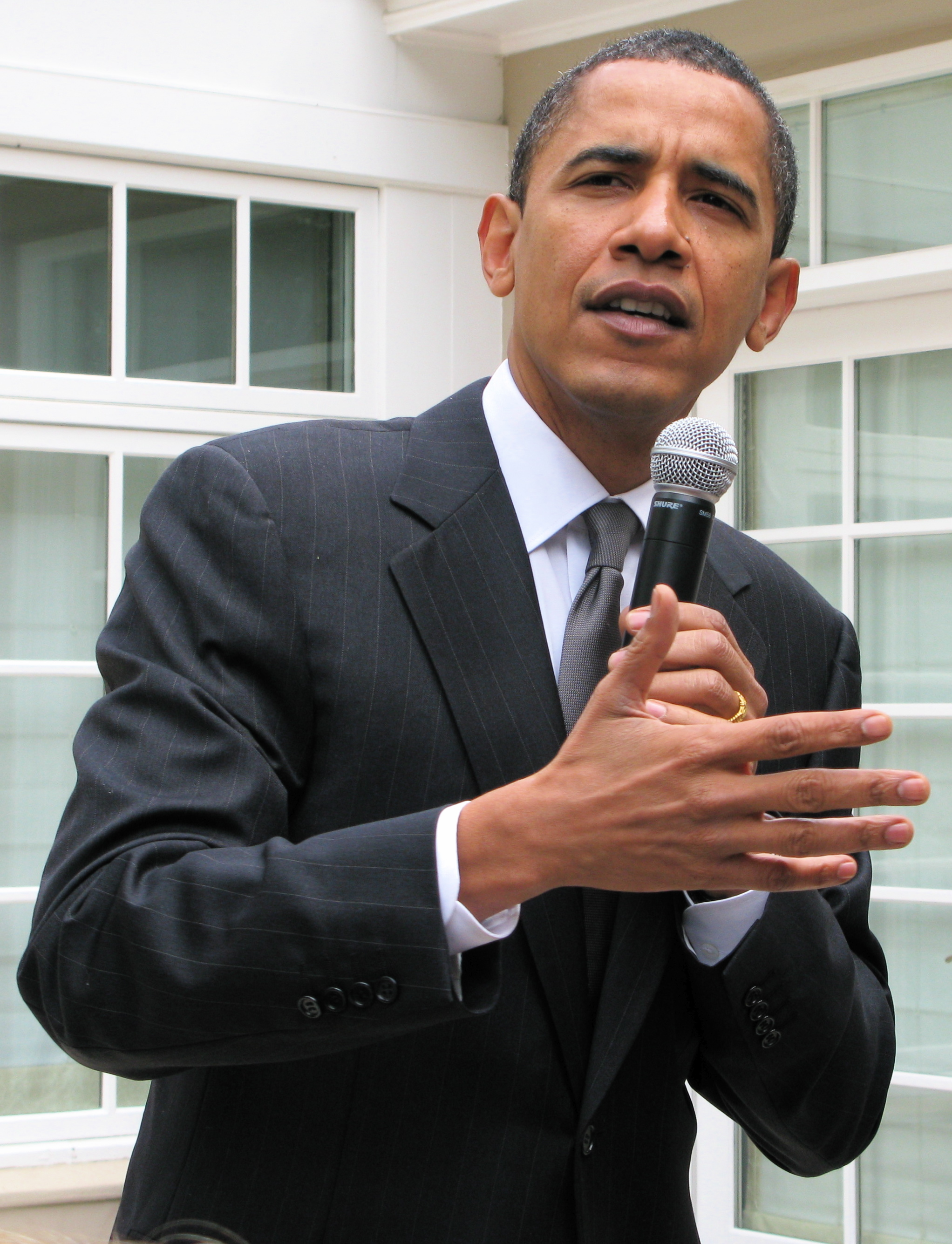 Barack Obama - 2008